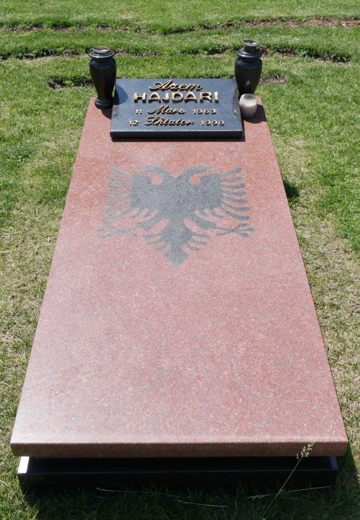 Grab des Studentenvertreters und Politikers Azem Hajdari (1963-1998) auf dem Heldenfriedhof in Tirana